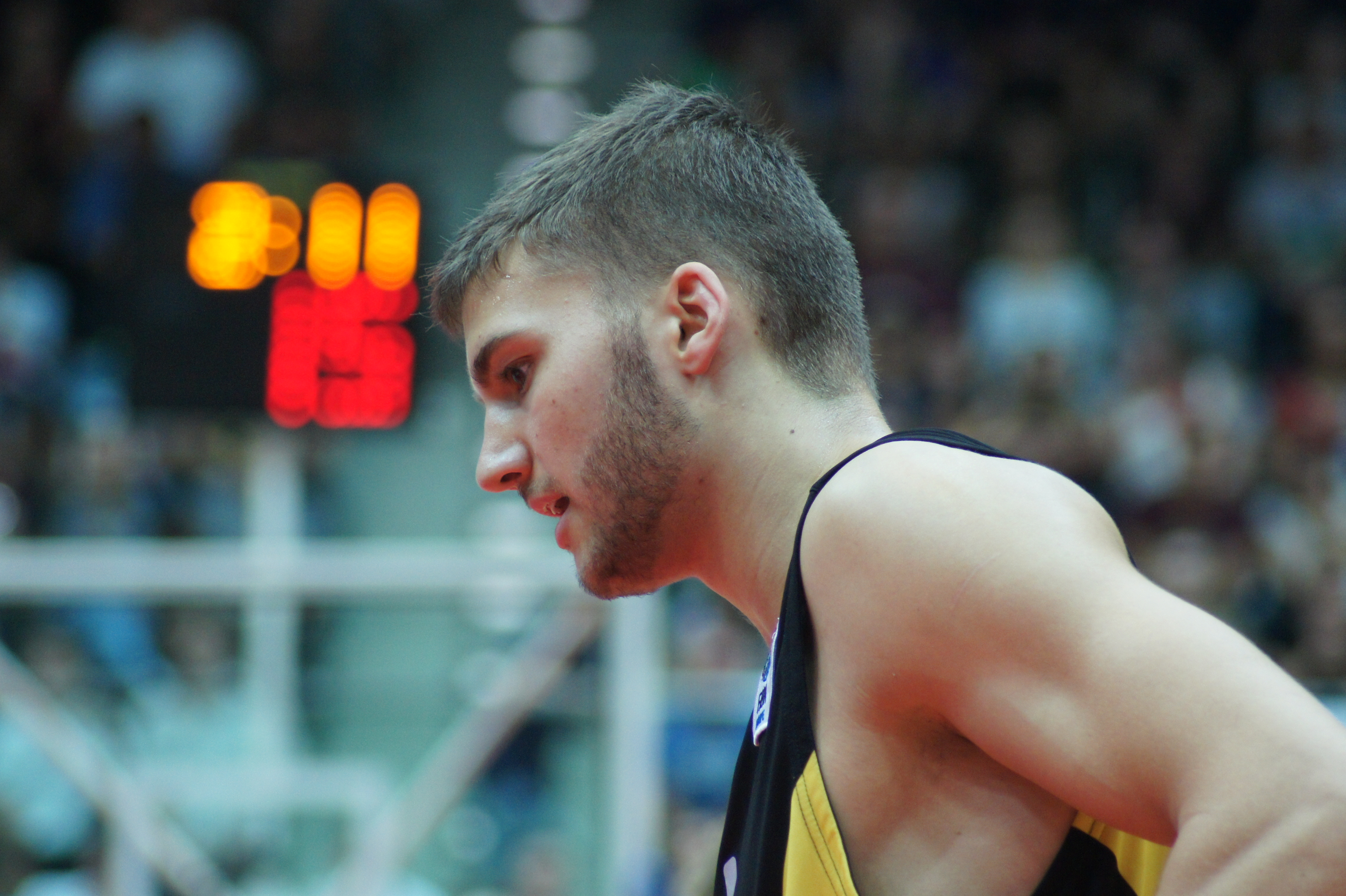 Qualifikationsspiel EuroBasket Österreich - Deutschland, 13. August 2014 im Multiversum Schwechat.